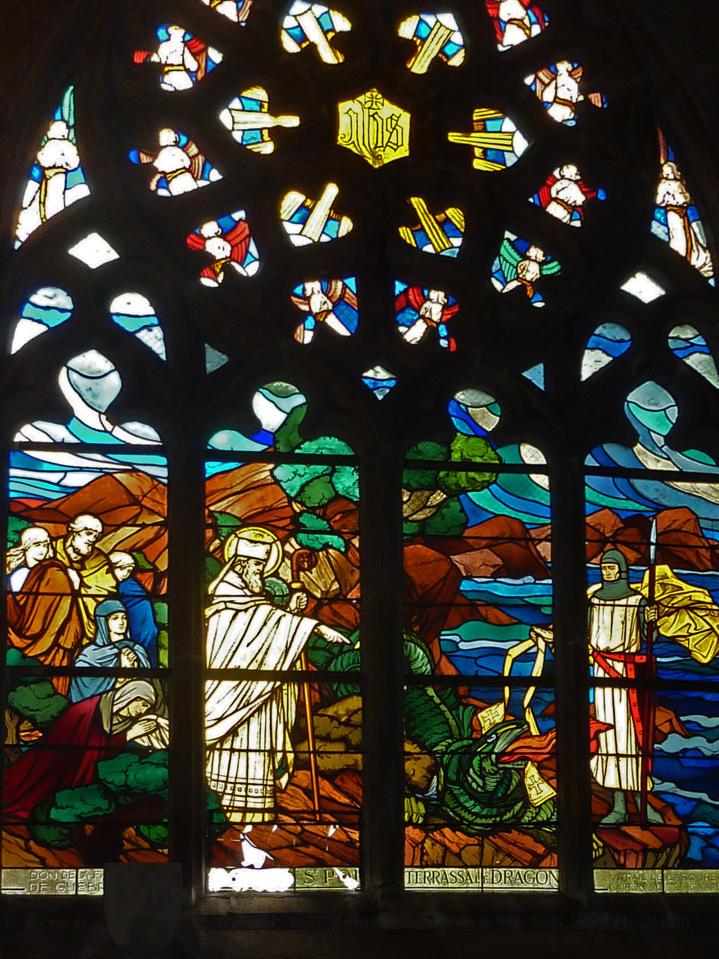 Saint-Pol-de-Léon : cathédrale Saint-Paul-Aurélien, vitrail (Pol Aurélien terrassant le dragon de l'Elorn)